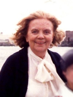 Heidi Kabel auf den Landungsbrücken in Hamburg